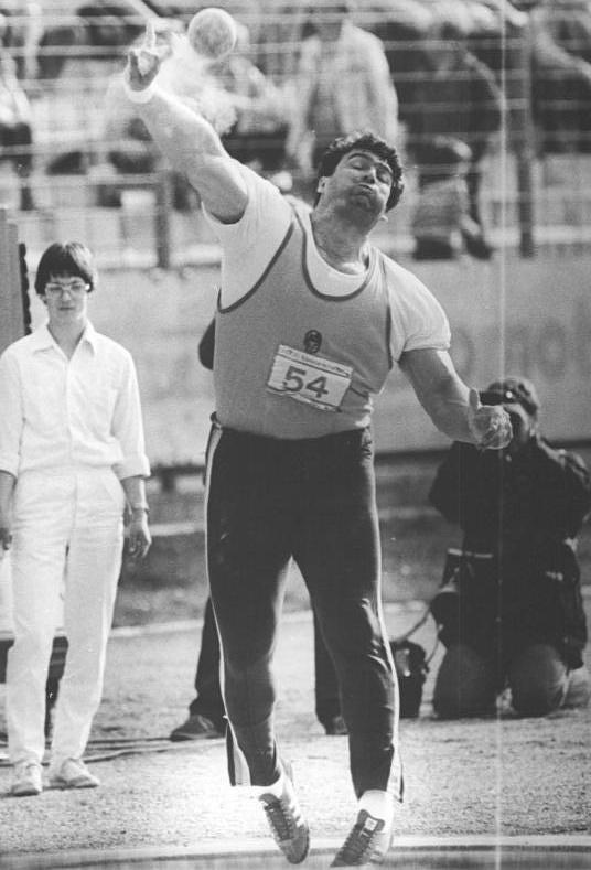 Udo Beyer ADN-ZB Kluge 01.06.1984 Erfurt: 35.Leichtathletik-Meisterschaften der DDR-Udo Beyer wurde mit 21,72 m DDR-Meister im Kugelstoßen.